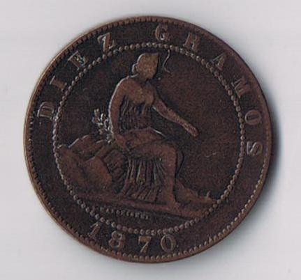 10 CÉNTIMOS 1870, España